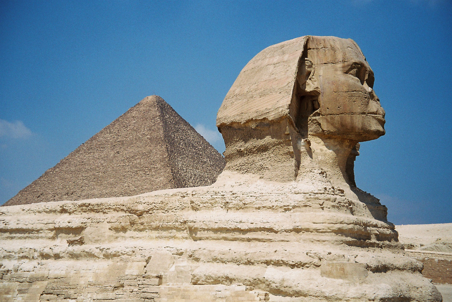 Fotografia feta des de l'explanada on si fan els musicals explicatius sobre l'Esfinge i les Piràmides